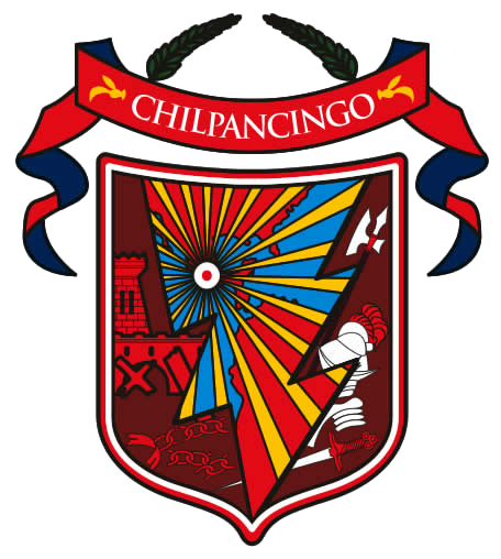 Chilpancingo de los Bravo